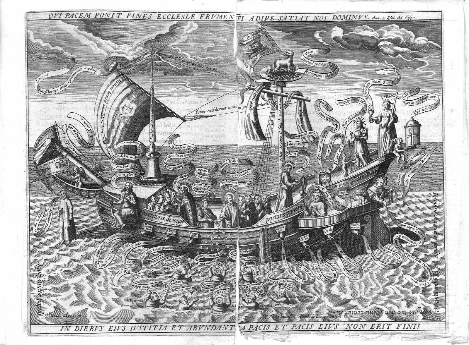 Melchor Prieto, Psalmodia eucharistica, Madrid, 1622, salmo quinto de vísperas. La nave de la iglesia, M. Prieto Inventor-Alardo de Popma sculpsit